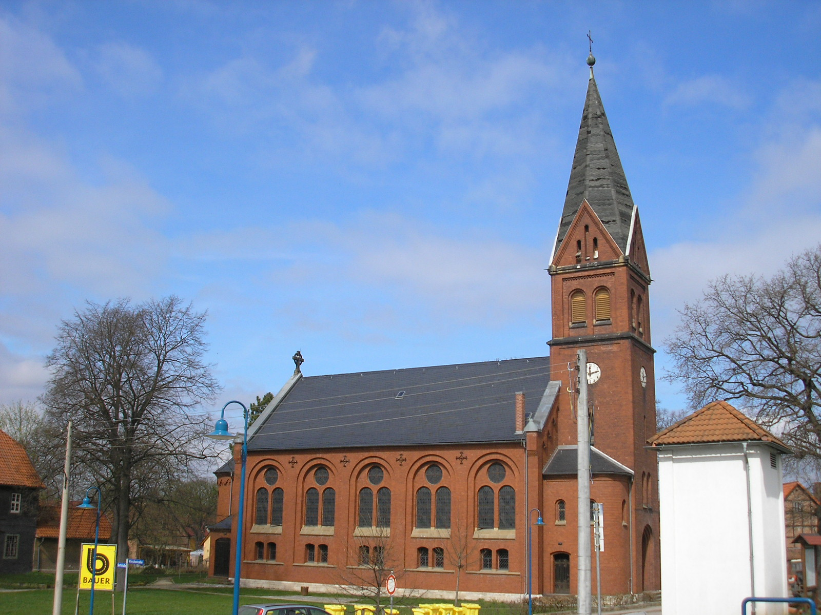 Die Dorfkirche in Ringleben bei Gebesee (Thüringen).